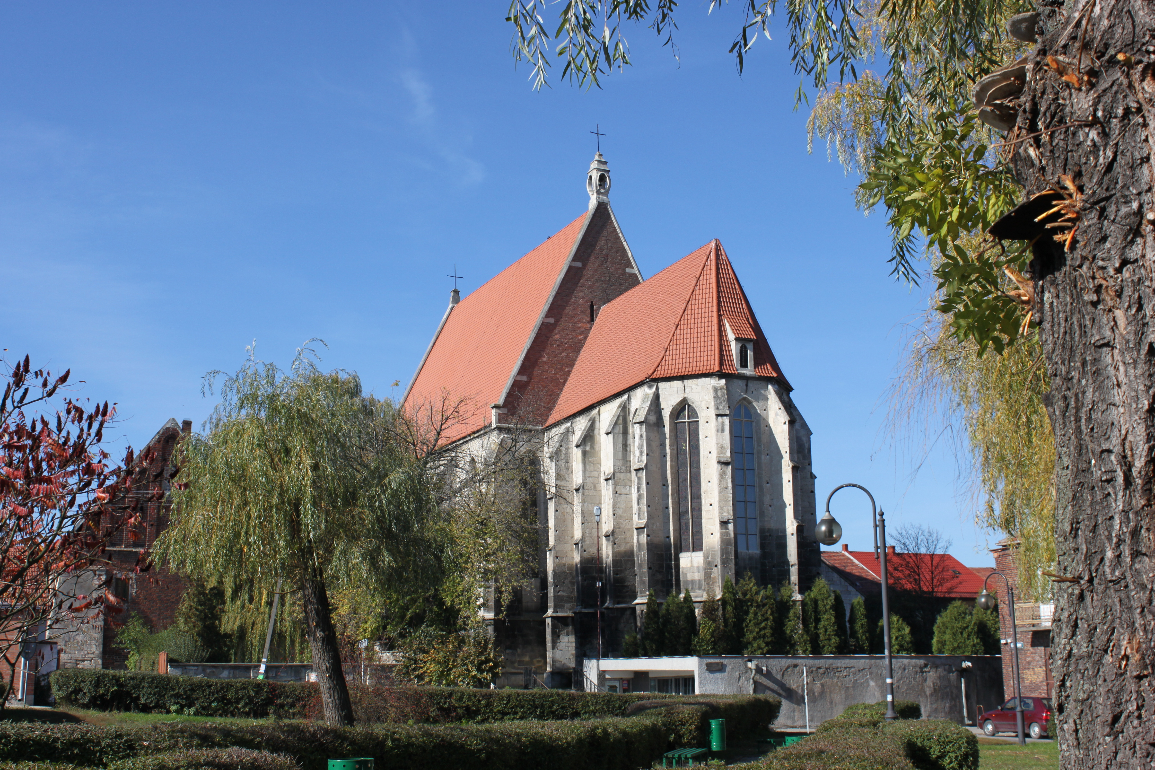 XV edycja Małopolskich Dni Dziedzictwa Kulturowego. Bazylika Kolegiacka Narodzenia NMP oraz Muzeum Regionalne w Wiślicy 18-19 maja. fot. J. Nowostawska-Gyalókay, MIK 2012